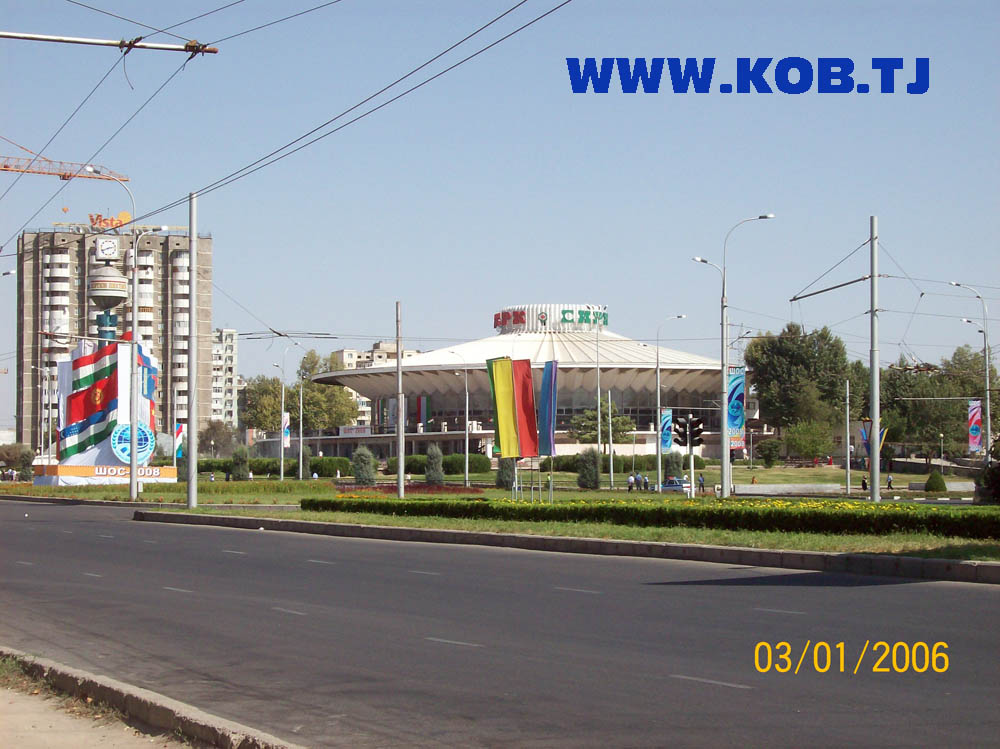 Цирк Таджикистана